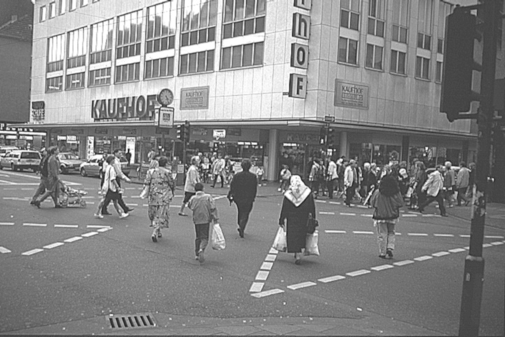 eigene Aufnahme